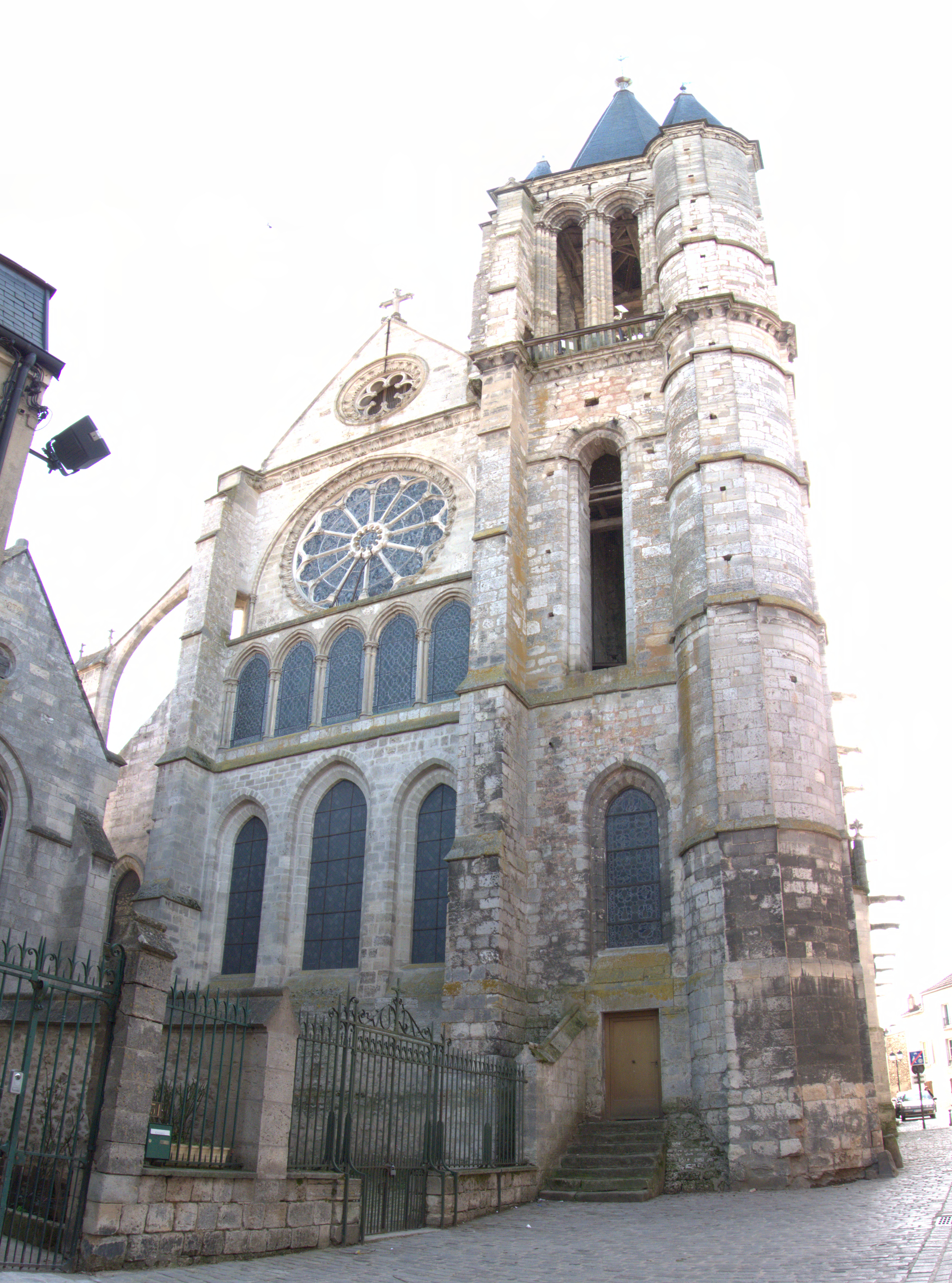 Église de Brie-Comte-Robert